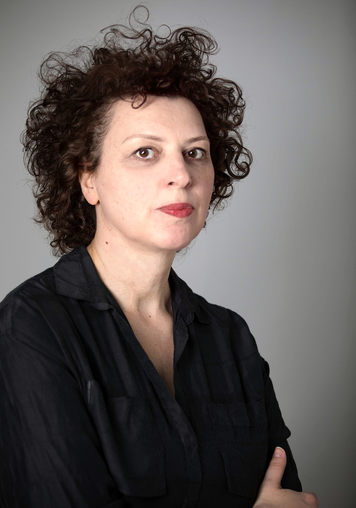 Portrait